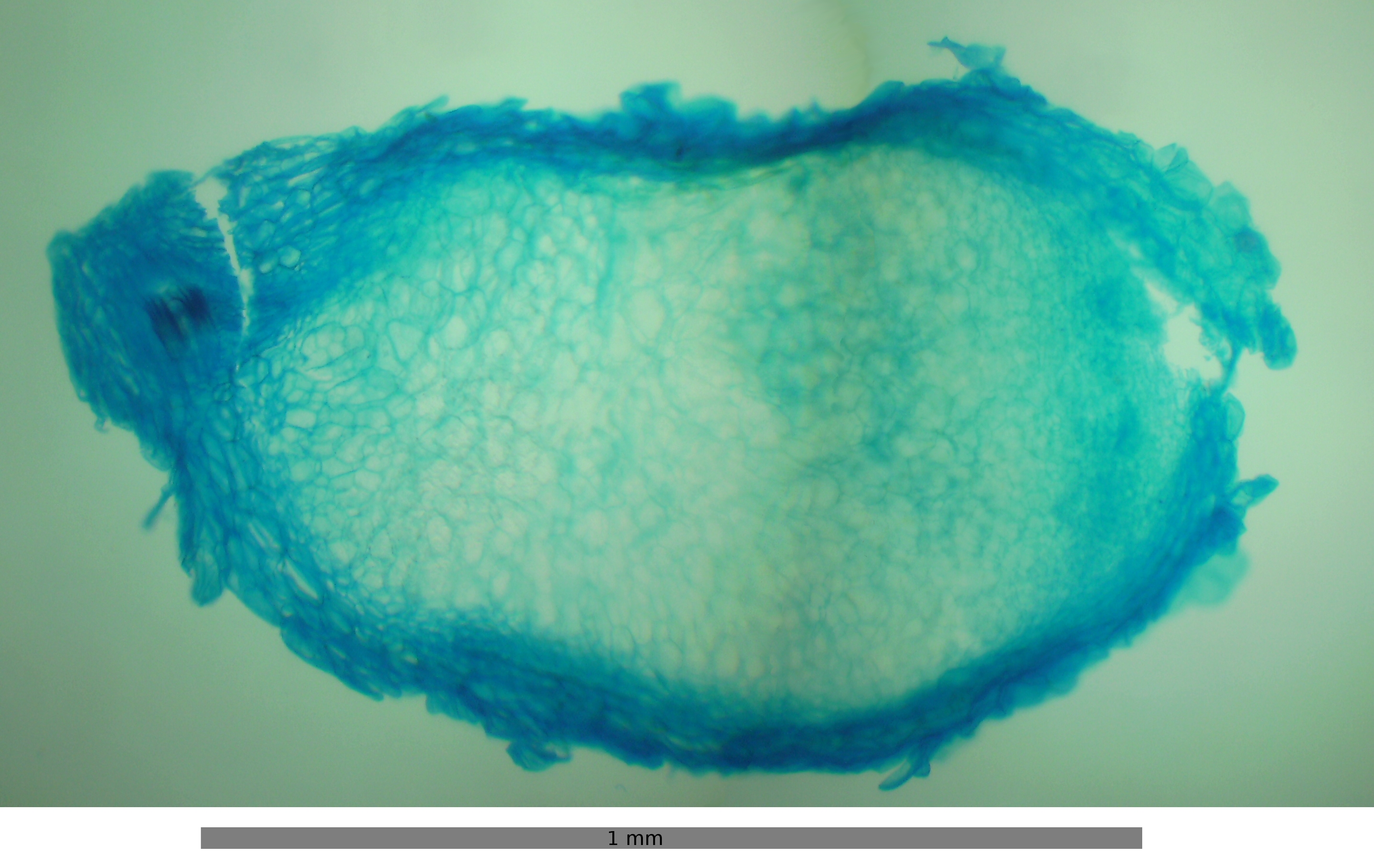 Querschnitt durch Wurzelknöllchen der Wicke (Vicia spec.); Fixierung: Formaldehyd; Färbung: Astrablau, Chrysoidin, Fuchsin nach Etzold (Zellulosezellwände blau, lignifizierte Zellwände rot); Vergrößerung: 100fach; Bild aus 2 Aufnahmen zusammengefügt. Links im Bild ist die Wurzel zu sehen, die das Wurzelknöllchen gebildet hat. In Ihrer Mitte ist das dunkelrot bis schwarz gefärbte Xylem zu sehen, das von einem blauen, kleinzelligen Phloemring umgeben ist. Rechts davon liegt das eigentliche Wurzelknöllchen, das von großzelligem, schwach gefärbtem Gewebe gebildet wird, in dem die hier nicht sichtbaren stickstoffixierenden Bakterien eingelagert sind. Wurzel und Wurzelknöllchen sind von einem blau gefärbten Abschlußgewebe umgeben.